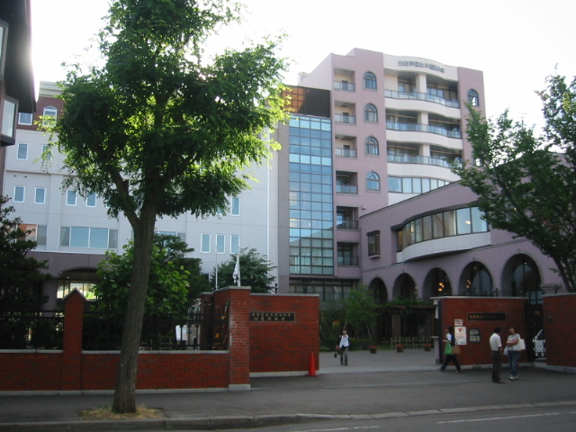 光塩学園女子短期大学。